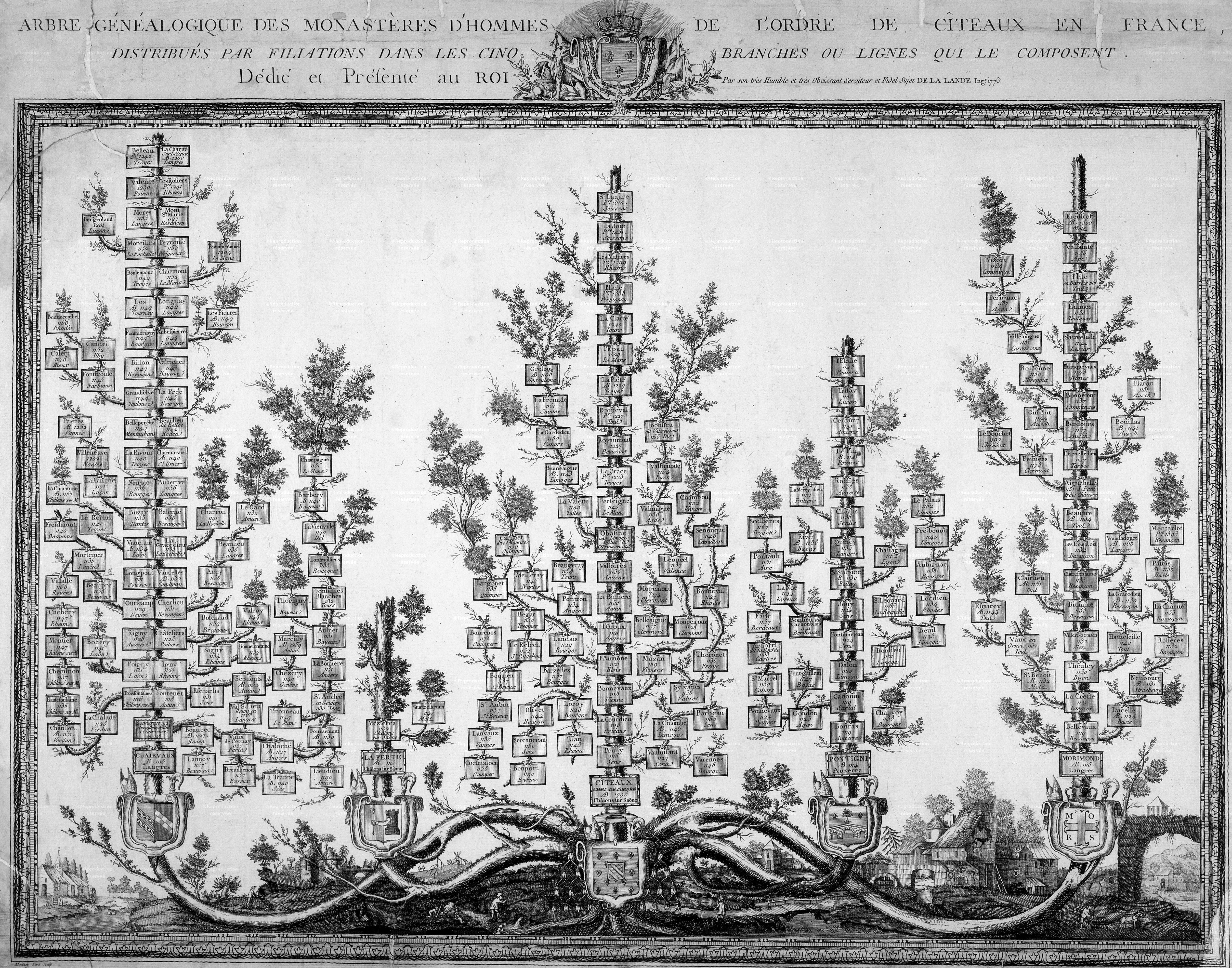 Arbre de filiation des monastères d'hommes de l'ordre cistercien (France uniquement), dressé en 1776 par M. de la Lande à l'attention du roi Louis XVI